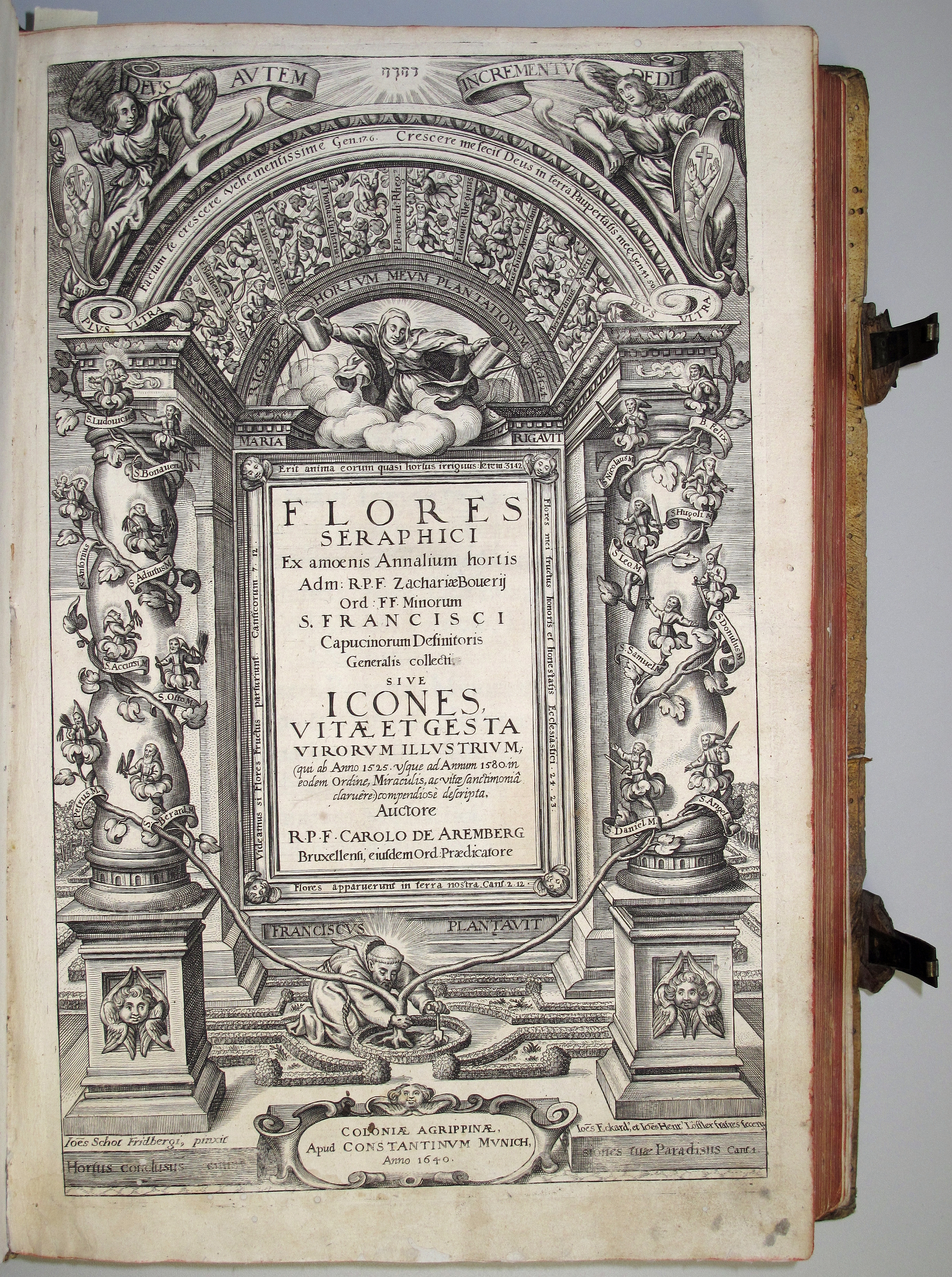 Titelblatt: Flores Seraphici: Ex amoenis Annalium hortis Adm: R.P.F. Zachariae Boverii Ord: FF. Minorum S. Francisci Capucinorum Definitoris Generalis collecti. Sive Icones, Vitae Et Gesta Virorum Illustrium; (qui ab Anno 1525. usque ad Annum 1580. in eodem Ordine, Miraculis, ac vitae sanctimonia claruere:) compendiose descripta / Charles d'Arenberg ... Coloniae Agrippinae : Munich, 1640. Wissenschaftliche Stadtbibliothek Mainz. Signatur: VI o:2°/448